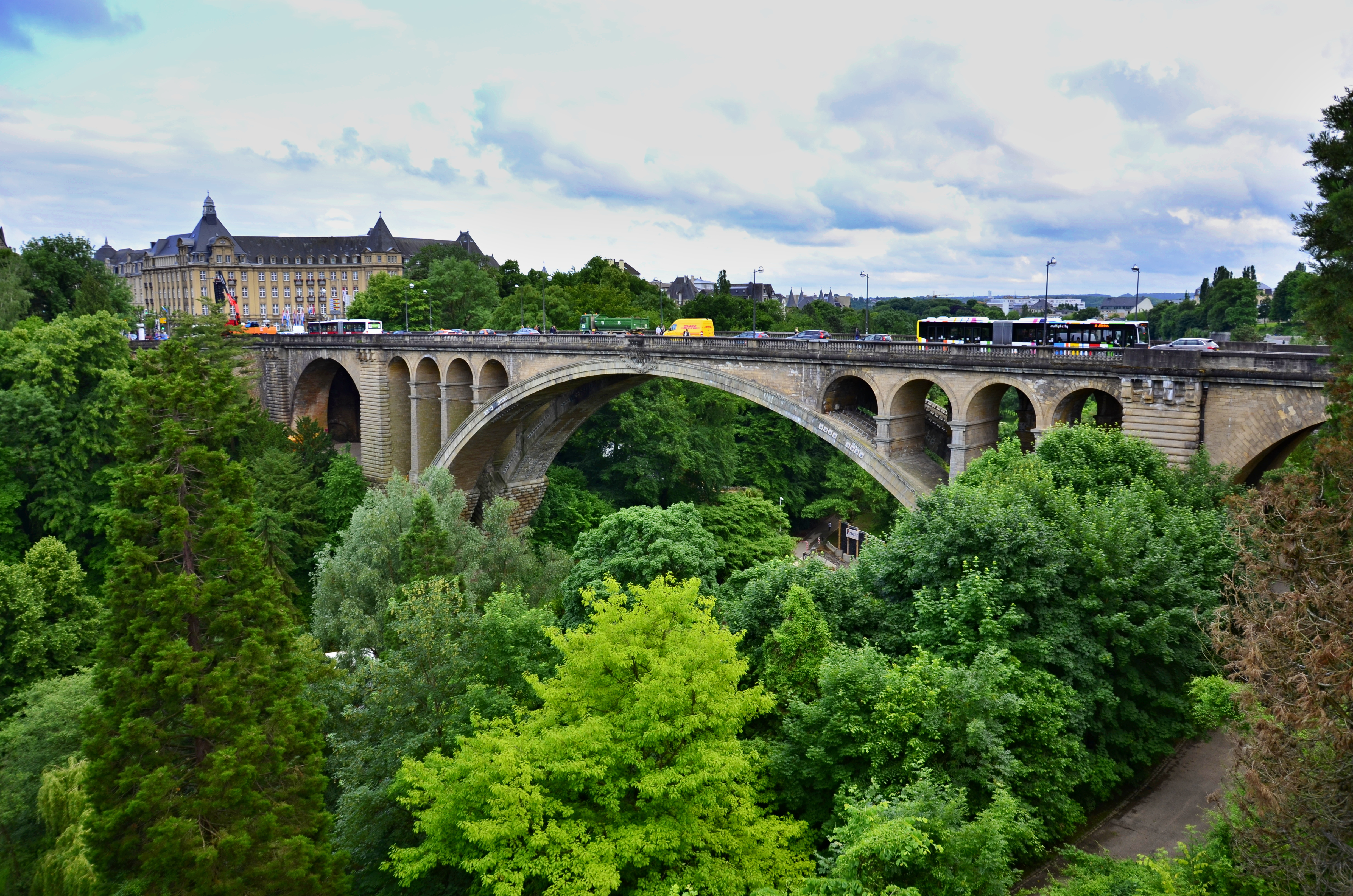 Luxembourg Capital City